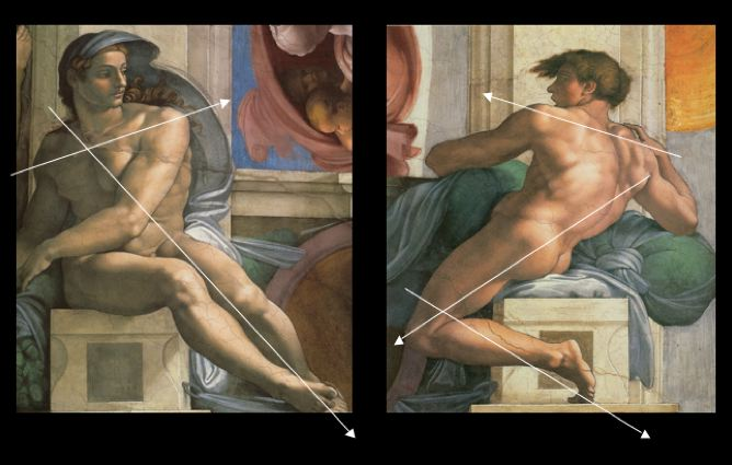 Ignudi du plafond de la chapelle Sixtine repris par Velasquez dans les Fileuses